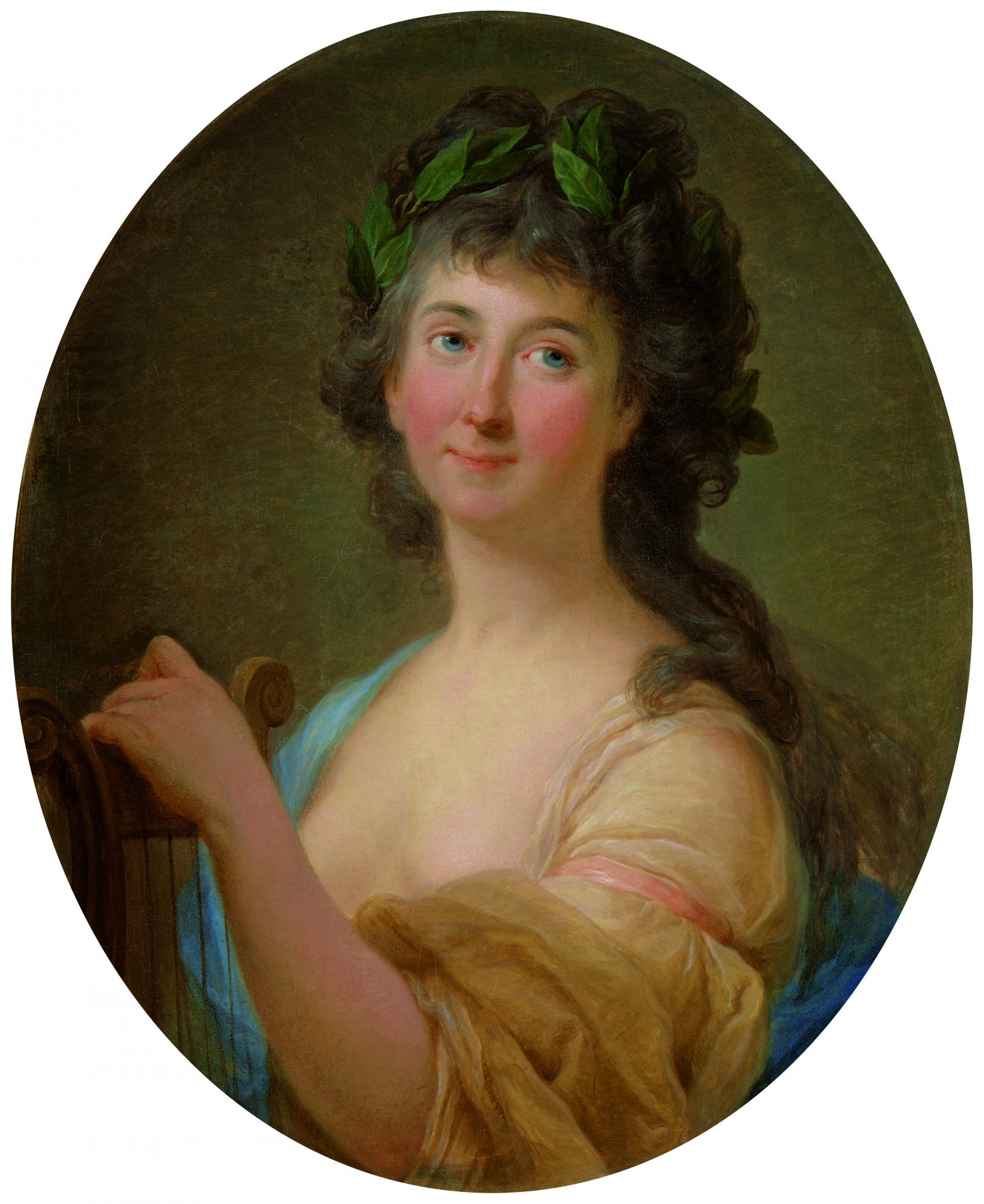 Portret Katarzyny Gattai Thomatis jako Muzy Bacciarelli, Marcello (1731-1818), malarz datowanieok. 1790-1795 rodzajobraz technikaolej materiałpłótno wymiary67,5 x 55,2 cm Caterina (Katarzyna) Gattai, urodzona jako Filipazzi, zamężna Tomatis (Mediolan 1747 – Warszawa ok. 1792), była włoską baleriną, żoną Carla Alessandra (Karola Aleksandra) Tomatisa (1739-1797), pierwszego antreprenera królewskiego teatru publicznego w Warszawie w latach 1765-1767; w sezonie 1765/1766 była pierwszą tancerką kierowanego przez męża zespołu teatralnego (zob. ŁKr 124). Na portrecie jej głowę zdobi wieniec z liści wawrzynu przyznawany artystom, dla ich uczczenia. Datowanie obrazu nasuwa pewne wątpliwości, w literaturze datowany na lata 1780-1785, ale ze względu na fryzurę portretowanej mógł on powstać na początku lat 90. XVIII wieku, i być może jest to idealizowany wizerunek powstały po śmierci artystki.